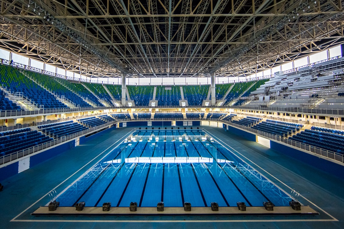 Interno dell'Estádio Aquático Olímpico di Rio de Janeiro